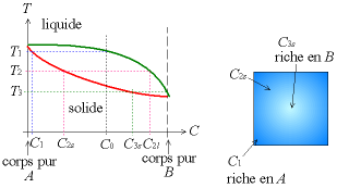 Suivi de la solidification hors équilibre avec un diagramme binaire ; le solide final est hétérogène. Auteur : Christophe Dang Ngoc Chan (Cdang), réalisé avec un programme de dessin vectoriel. Licence GFDL Christophe Dang Ngoc Chan